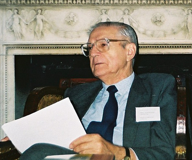 Aleksander Gieysztor, Nieborów Palace, Poland.